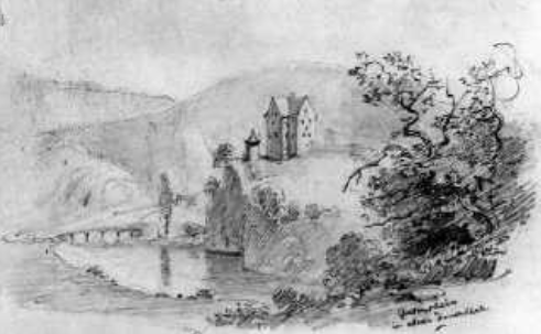 Schloss Gutenstein im oberen Donautal - Bleistiftzeichnung von Eduard von Kallee um 1850. Blick über die Donau auf das Schloss mit Donaubrücke. Skizzenbuch 2 Bl. 9 Sammlung Hagmayer 12 x 19 cm Schefold Nr. 24292.